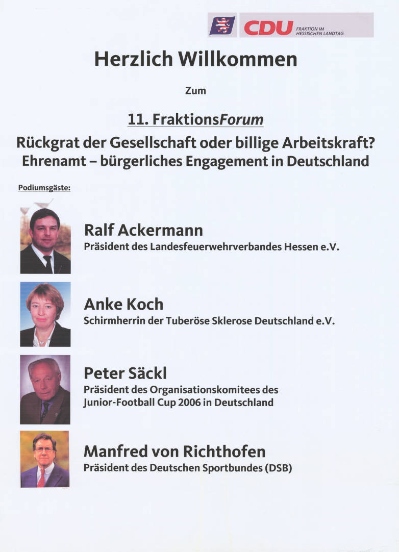 Herzlich Willkommen zum 11. FraktionsForum Rückgrat der Gesellschaft oder billige Arbeitskraft? Ehrenamt - bürgerliches Engagement in Deutschland Podiumsgäste: Ralf Ackermann Präsident des Landesfeuerwehrverbandes Hessen e.V. Anke Koch Schirmherrin der Tuberöse Sklerose Deutschland e.V. Peter Säckl Präsident des Organisationskomitees des Junior-Football Cup 2006 in Deutschland Manfred von Richthofen Präsident des Deutschen Sportbundes (DSB)Abbildung:PorträtfotosPlakatart:AnkündigungsplakatAuftraggeber:CDU Fraktion im Hessischen LandtagObjekt-Signatur:10-031 : 81Bestand:CDU-Plakate (10-031)GliederungBestand10-18:CDU-Plakate (10-031) » Parteitage, ParteikongresseLizenz:KAS/ACDP 10-031 : 81 CC-BY-SA 3.0 DE